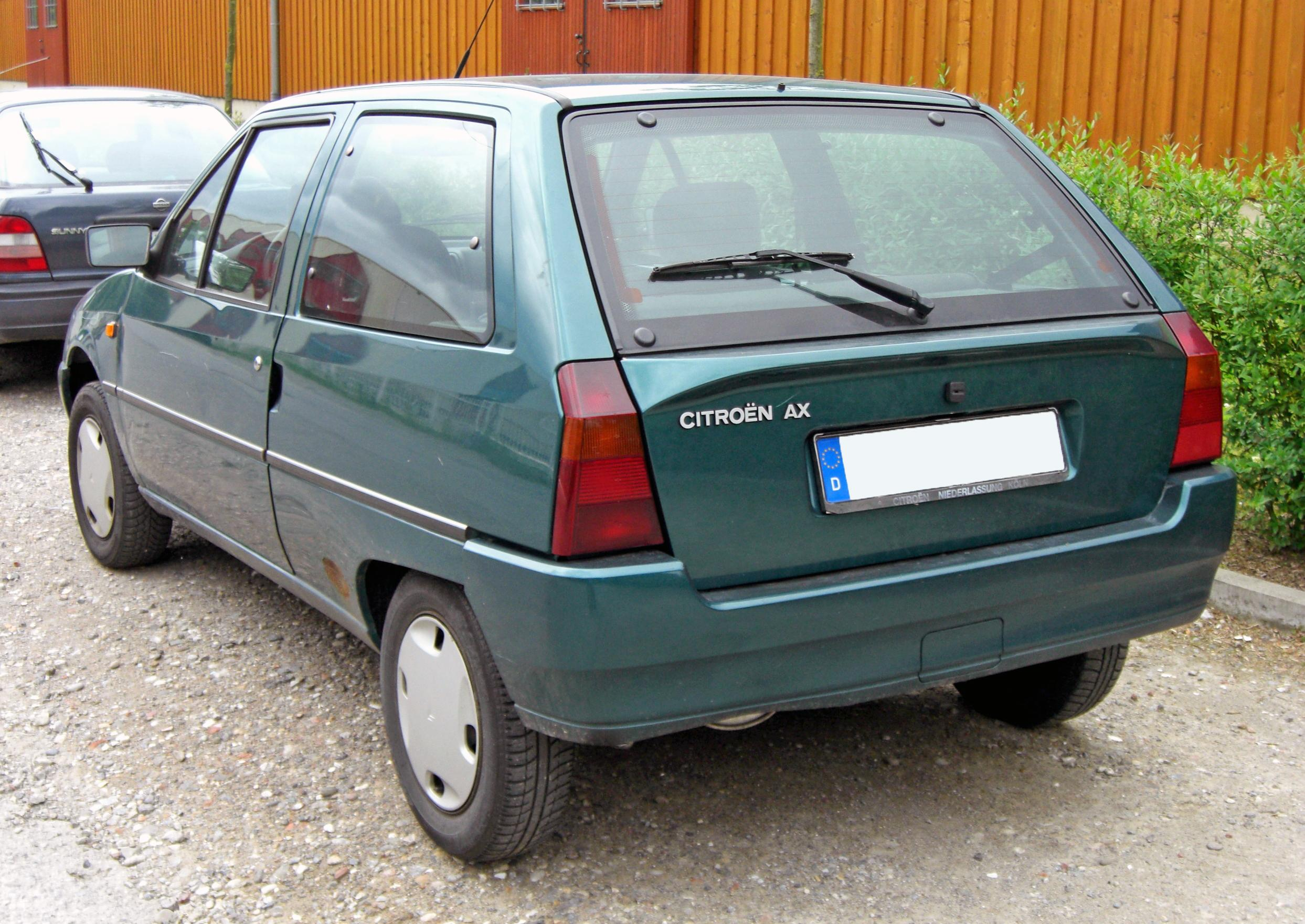 Citroën AX